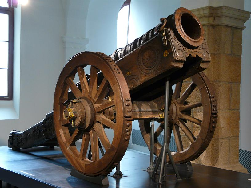 Mittelalterliche Steinbüchse „Faule Magd“ im Militärhistorischen Museum Dresden.